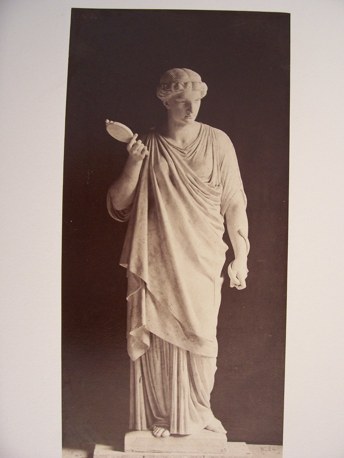 Le Nouvel Opéra de Paris. Statues décoratives (35 planches) Statues dans le Grand Foyer: Planche 24: La Prudence (par Frison)